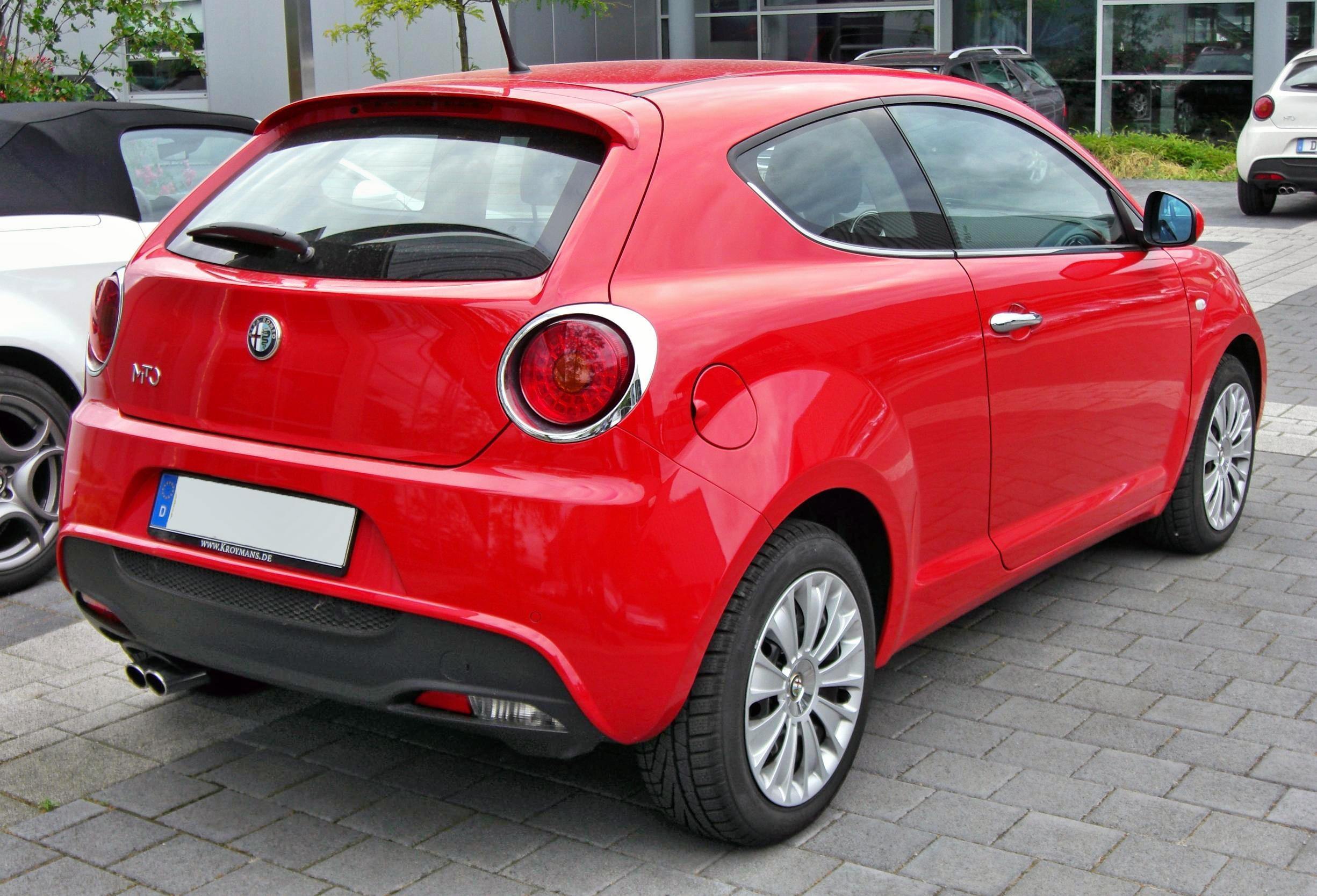 Alfa MiTo